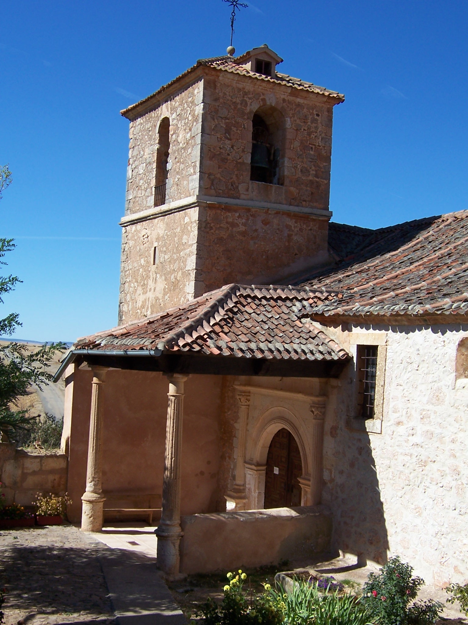 Portico y campanario de la iglesia